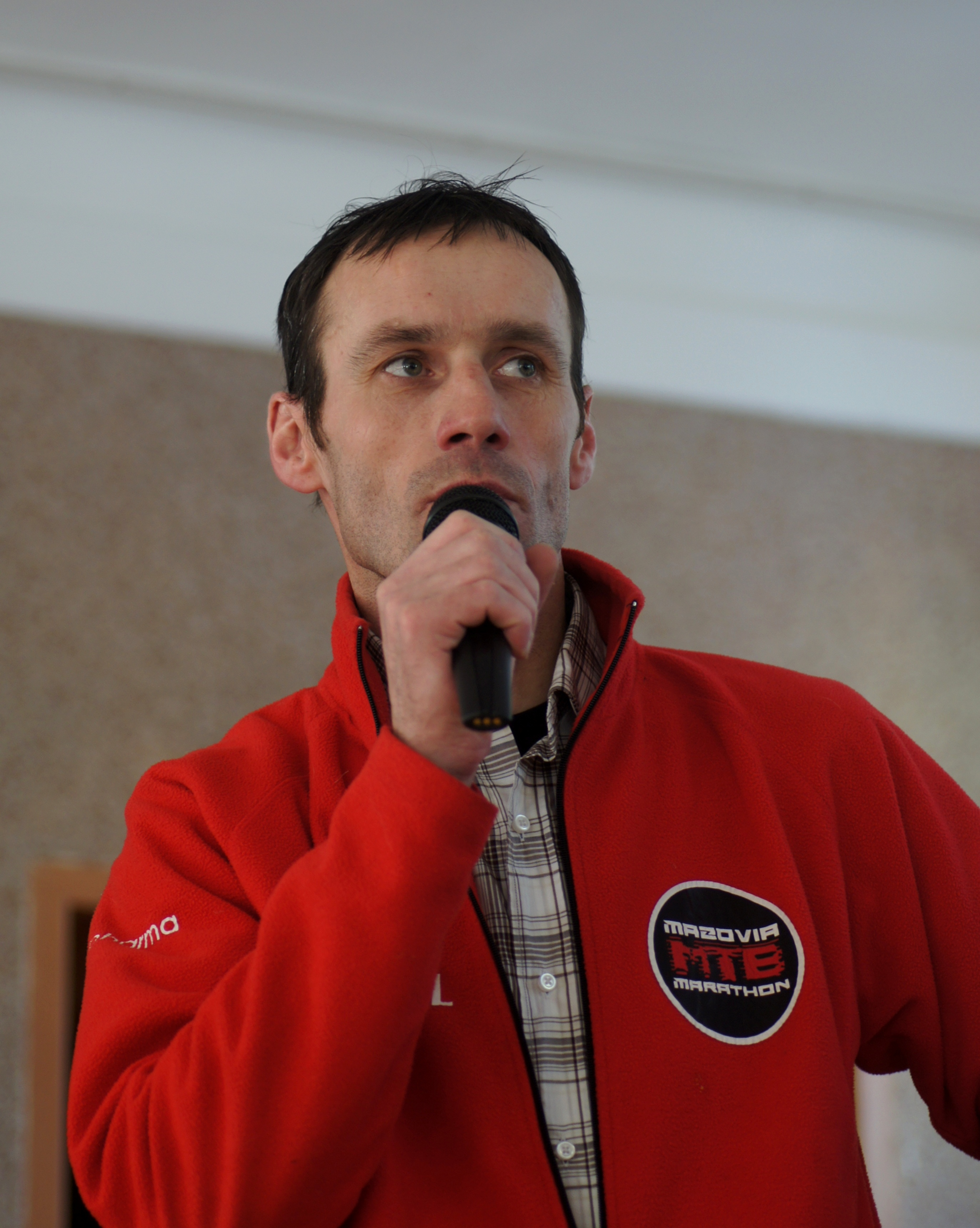 Cezary Zamana jako organizator wyścigów Mazovia MTB Marathon. Northtec MTB Zimą - Józefów 2011